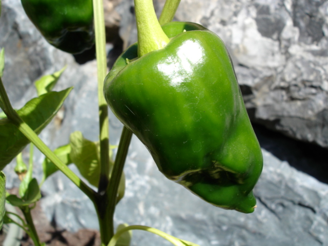 Chile poblano, una variedad de Capsicum annuum